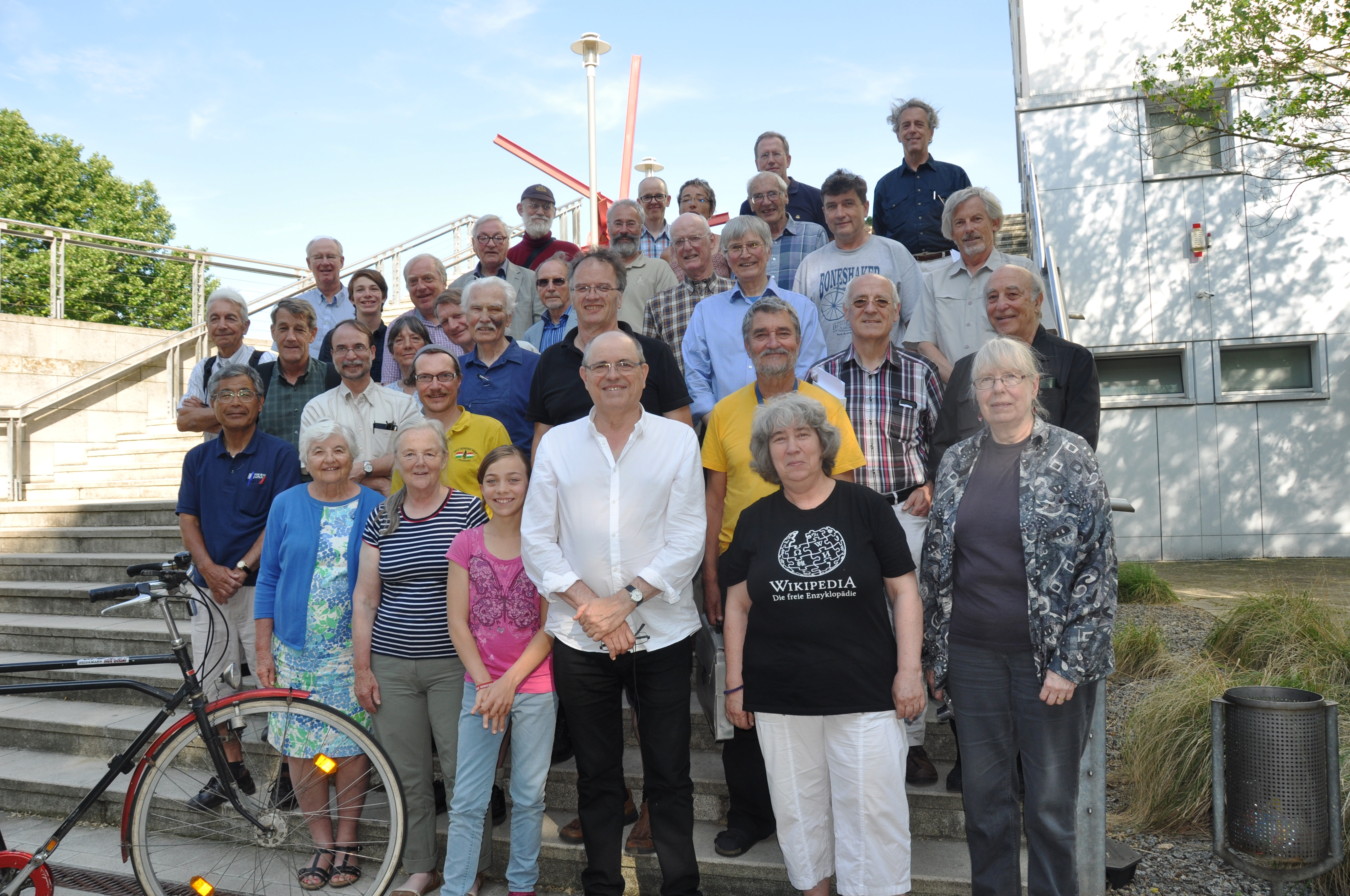 Foto von einem Teil der Teilnehmer an der ICHC 2017 The making of this document was supported by the Community-Budget of Wikimedia Germany.